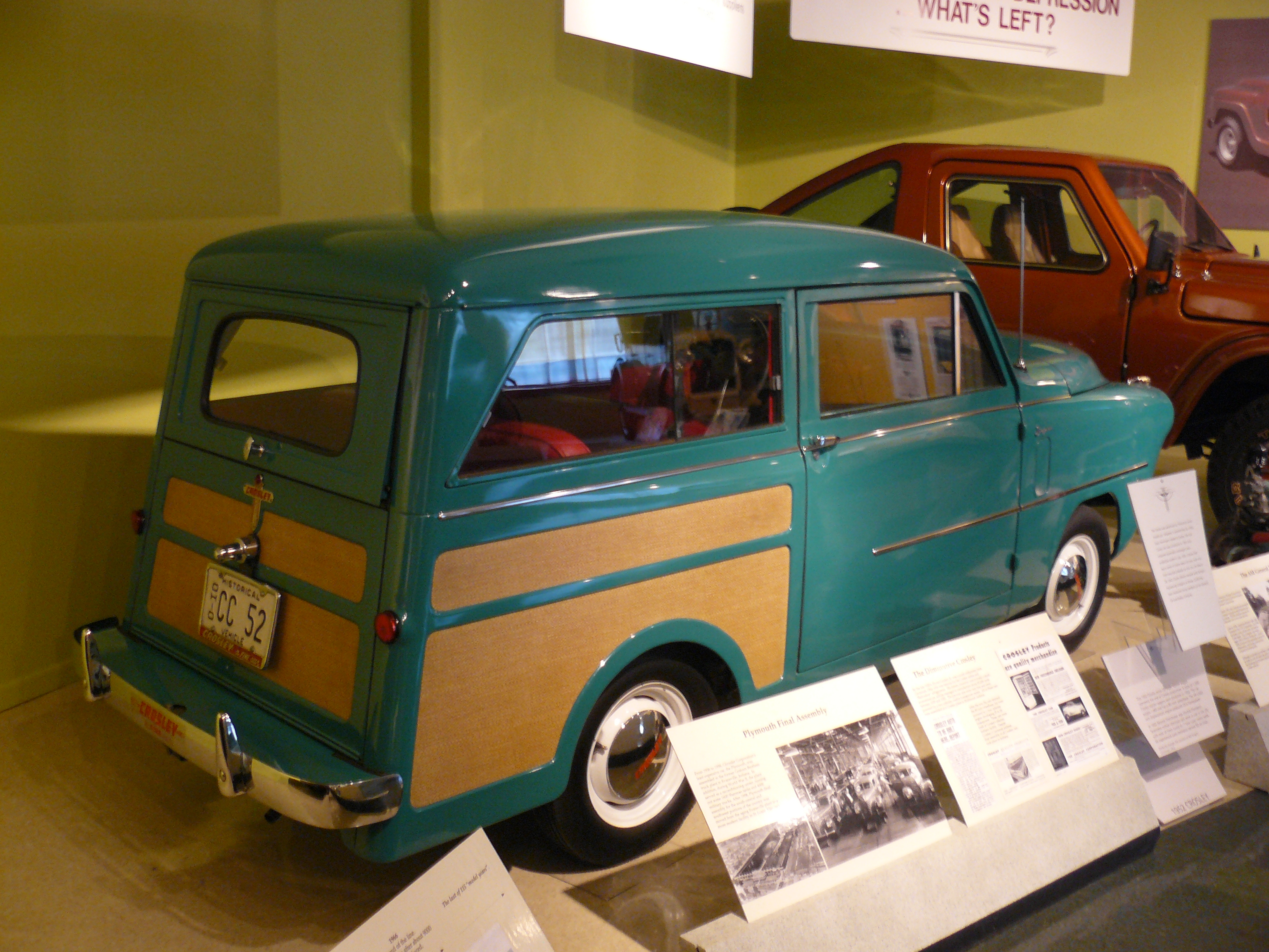 Auburn 2013